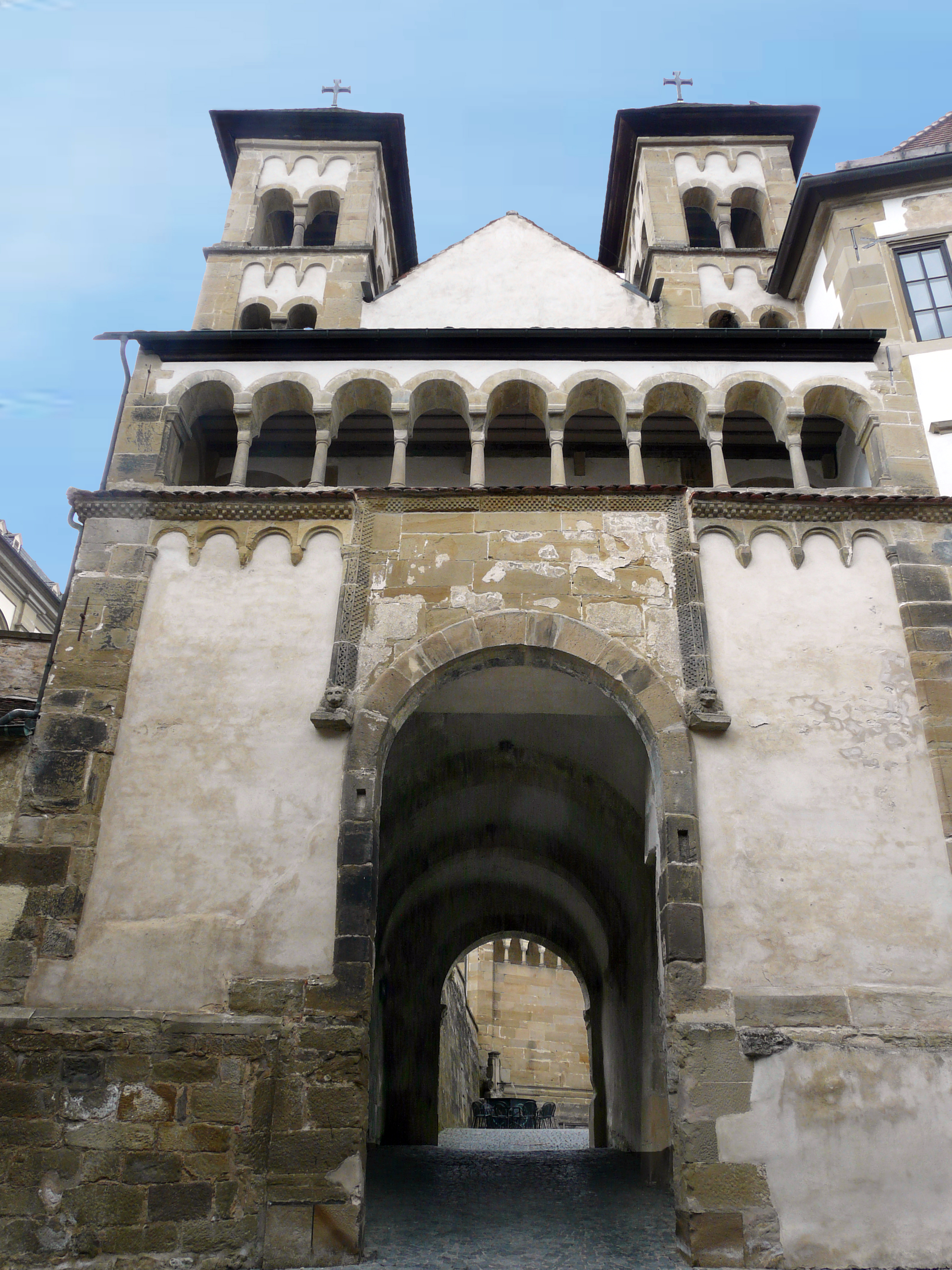 Капелла Св. Михаила